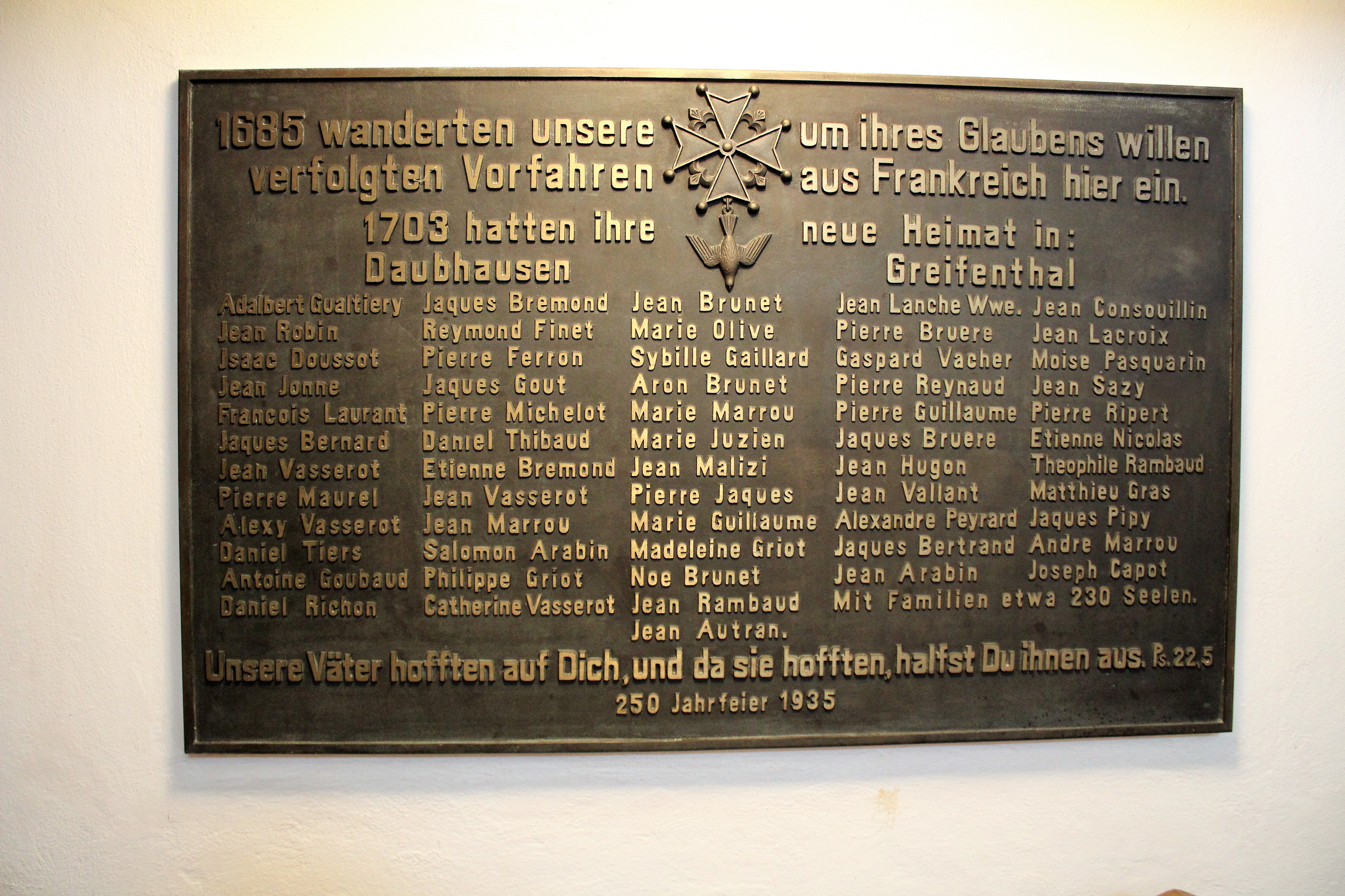 Evangelische Kirche Daubhausen, Lahn-Dill-Kreis, Hessen, Deutschland